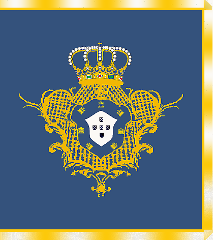 Bandeira do senado da câmara de São Paulo, no período colonial, real e imperial. É uma bandeira de seda azul com as armas reais no centro, bordadas a seda amarela e branca e ricamente ornamentadas em estilo barroco. Tem franjas e cadarços amarelos. [1] Essa é uma bandeira que como outras de sua época, eram bandeiras do Senado da Câmara, um equivalente à Câmara de Vereadores, ao qual era instalada juntamente com a criação de vilas e cidades, seguindo as orientações contidas nas Ordenações Manuelinas e Filipinas, era um órgão consultivo, legislativo e judiciário. Atuava como representante dos interesses da população, de sua composição faziam parte os “homens de bem”, isto é, pertencentes à nobreza, ao clero e à milícia, sendo chamados de oficiais devido ao fato de cada membro possuir um encargo.